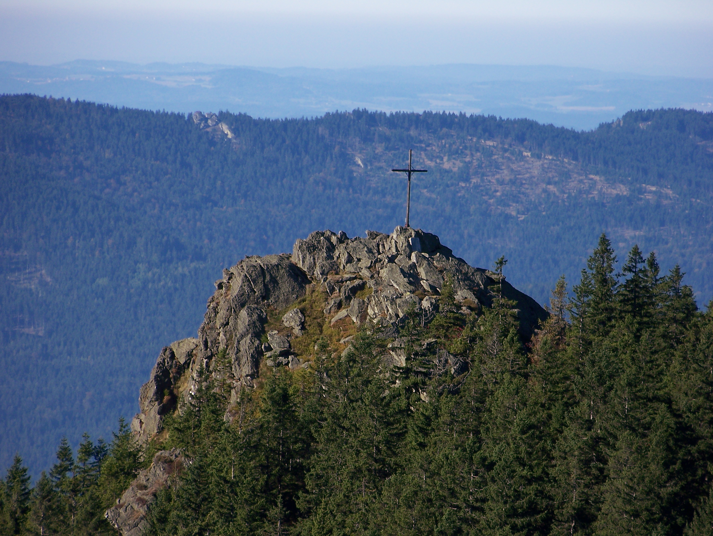 Blick vom Großen auf den Kleinen Osser